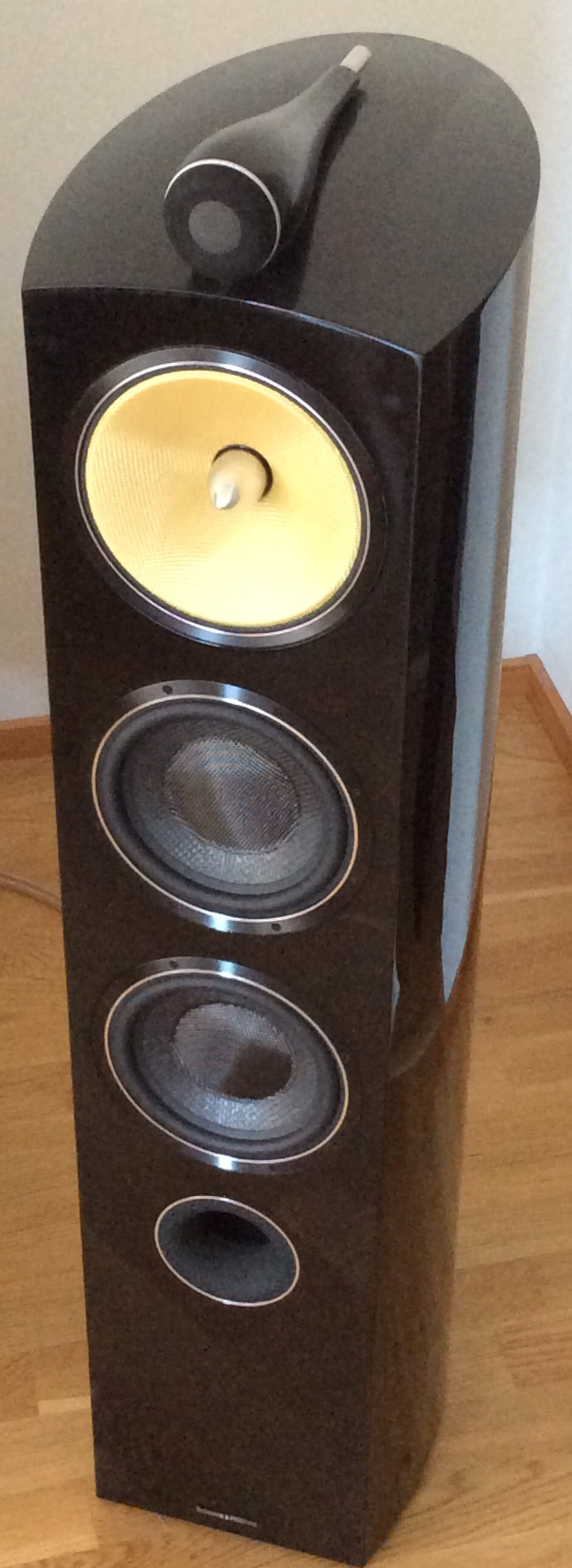 Nelitiekaiutin bassorefleksiputkella ja timanttikalvoisella diskanttielementillä.